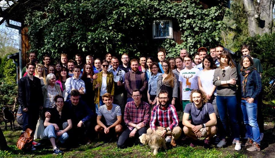 Członkowie Stowarzyszenia Miasto Jest Nasze podczas Walnego Zebrania, m.in. Paweł Przewłocki (2. od lewej kuca), Anna Jakubiec-Puka (1. rząd stojący, 2. od lewej), Jan Mencwel (stoi w środku, z brodą)